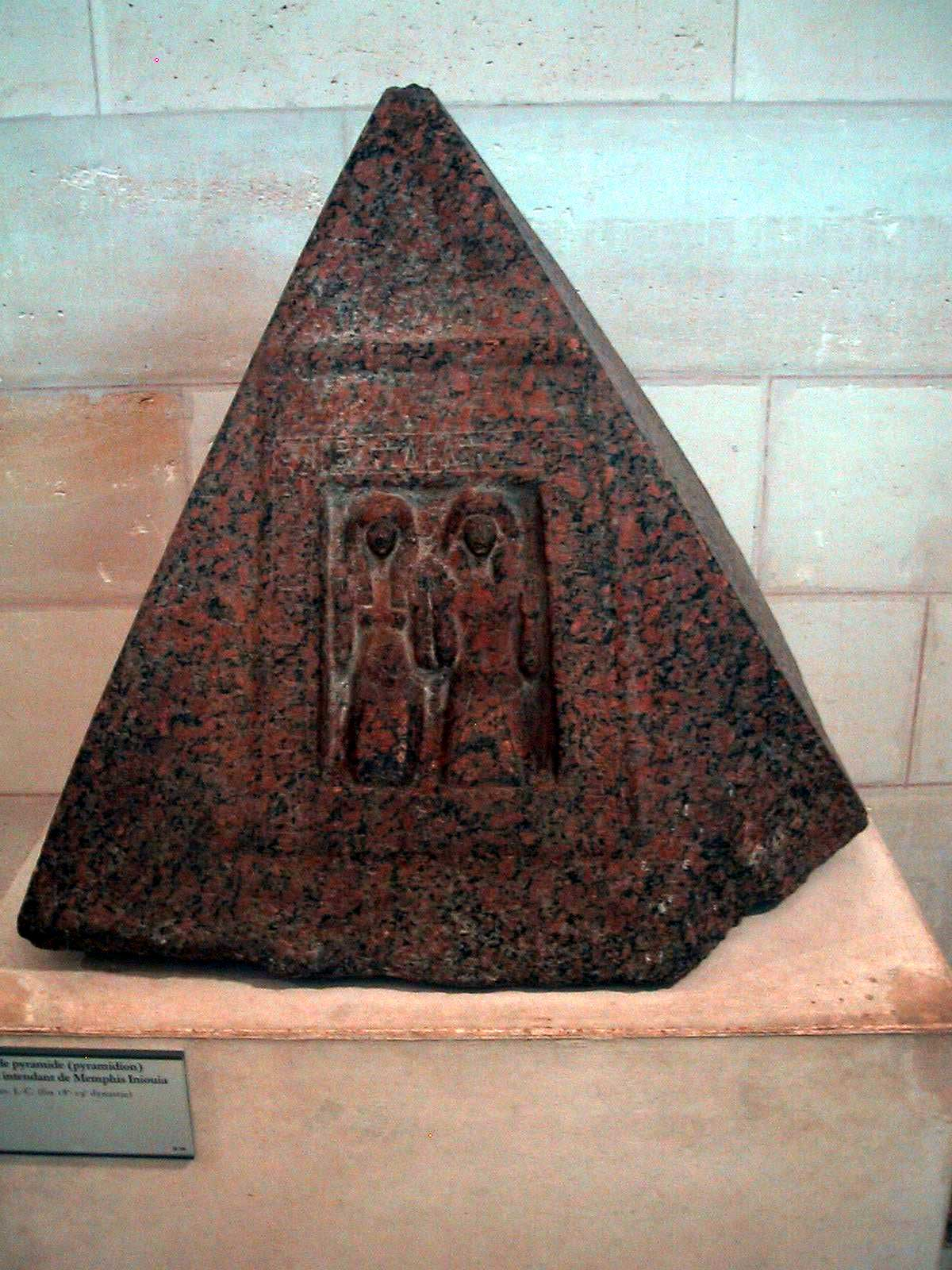 Pyramidion du grand intendant de Memphis Iniouia, Saqqara, vers 1300 avant J.-C. (fin 18e - 19e dynastie)